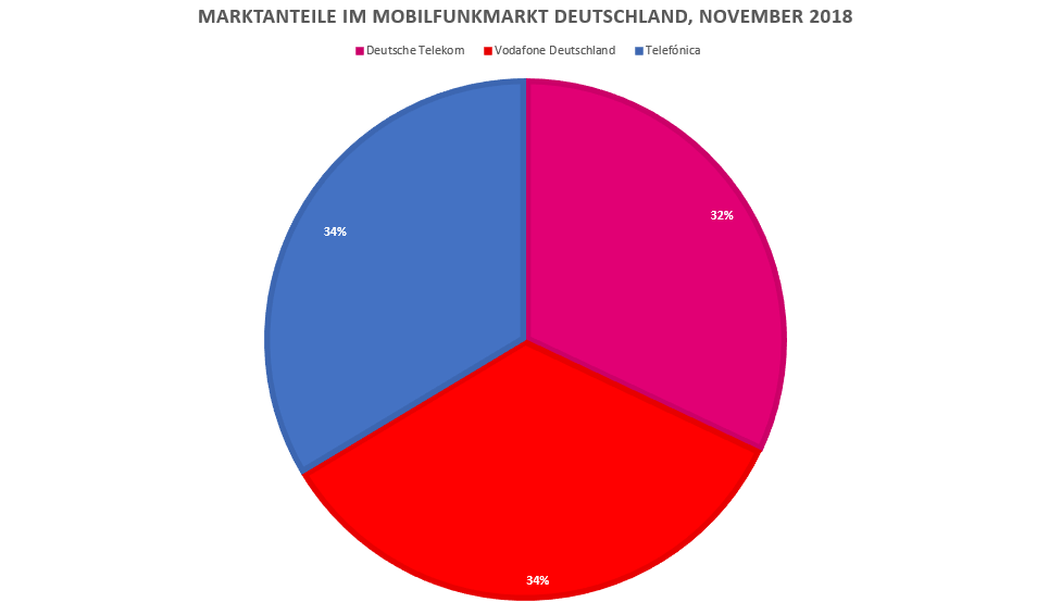 Marktanteile* der drei Mobilfunknetzbetreiber in Deutschland (Stand: November 2018) Die starken Zugewinne bei Vodafone basieren auf einer geänderten Zählweise seitens Vodafone.